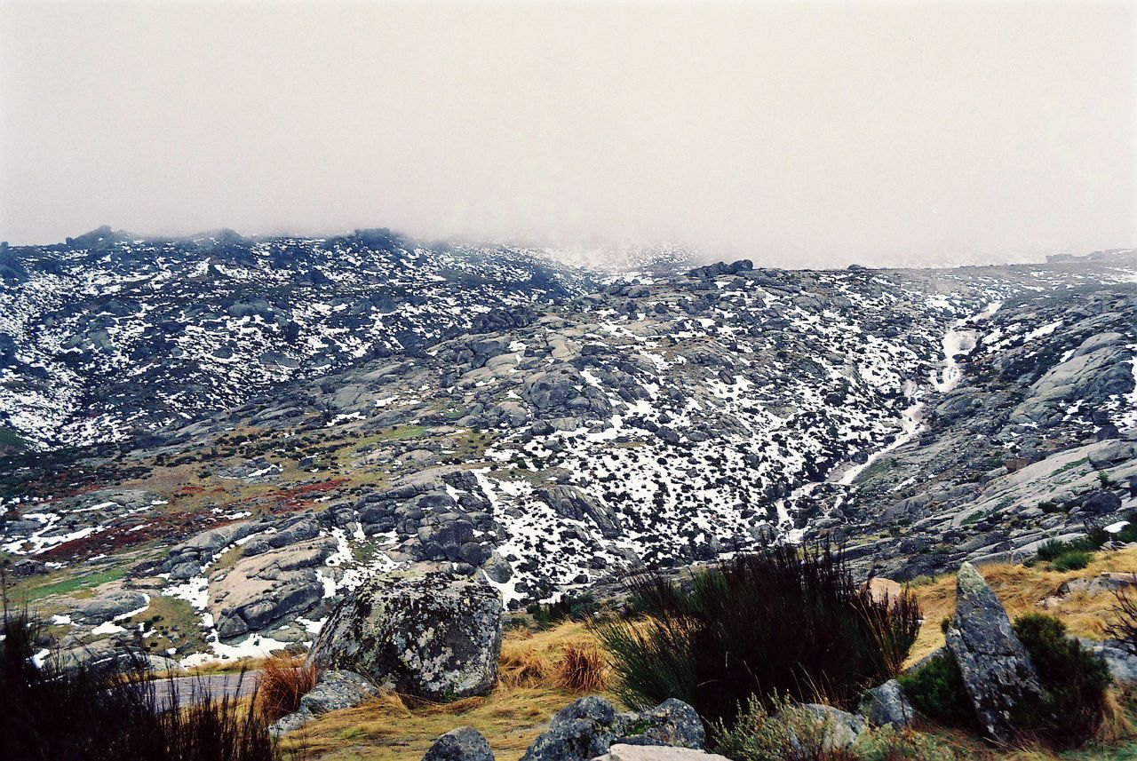 Panoramas 360º da Serra da Estrela